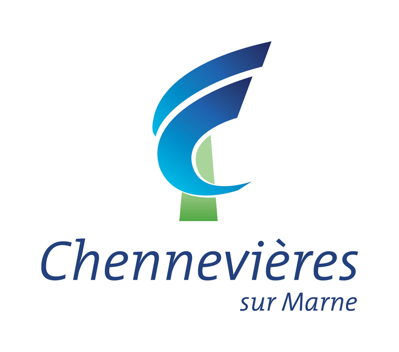 Le logo de Chennevières-sur-Marne reproduit le « C » de Chennevières, enchâssé dans la boucle dessinée par le fleuve au pied de la ville.